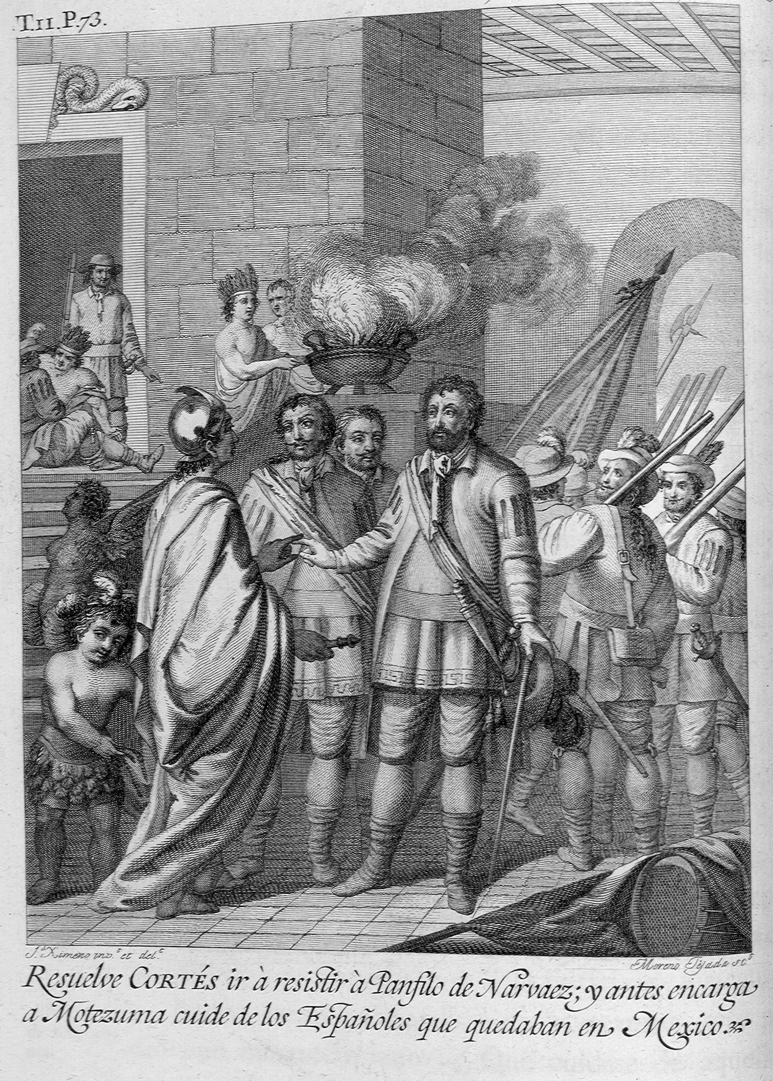 Autor: Solis y Rivadeneyra, Antonio de, 1610-1686 Descripción bibliográfica: Historia de la conquista de Mexico : poblacion y progresos de la America Septentrional conocida por el nombre de Nueva España / escribiale Don Antonio de Solis. - En Madrid : en la imprenta de D. Antonio de Sancha : se hallara en su Libreria en la Aduana Vieja, 1783-1784. - 2 v. (I: L, 489 p., [1] en bl., [8] p., [14] h. de grab.-[1] h. de map. pleg.; II: [2], VIII, 460, [3] p., [1] en bl., [12] h. de grab., [1] h. de map. pleg.) :|bil. ; 8º. - Sign.: I: 4, 2*-6*4, 7*1, A-3O4, 3Q1, a4 ; II: 2, *4, A-3M4. Notas: Antep. - Apostillas marginales. - Las h. de grab. calc. : "Titian Vecel. pinx., Ferdin Selma sc." ; "Joseph Ximeno del., Ferdin Selma sc." ; "Ildefonso Vergàz la inventò y dibujò, Juan Moreno Tejada la grabò" ; "Arnal invt. et dt.". - Inic. y frisos adornados xil. Ilustrador: Vecellio, Tiziano, il. Ilustrador: Selma, Fernando, 1752-1810, il. Ilustrador: Ximeno, José, 1757-1807 il. Ilustrador: Vergáz, Ildefonso, s. 18, il. Ilustrador: Moreno Tejada, Juan, 1739-1805, il. Ilustrador: Arnal Navarro, Juan Pedro, 1735-1805, il. Impresor: Sancha, Antonio de, 1720-1790, imp. Lugar de impresión: España. Madrid Localización: Libro completo